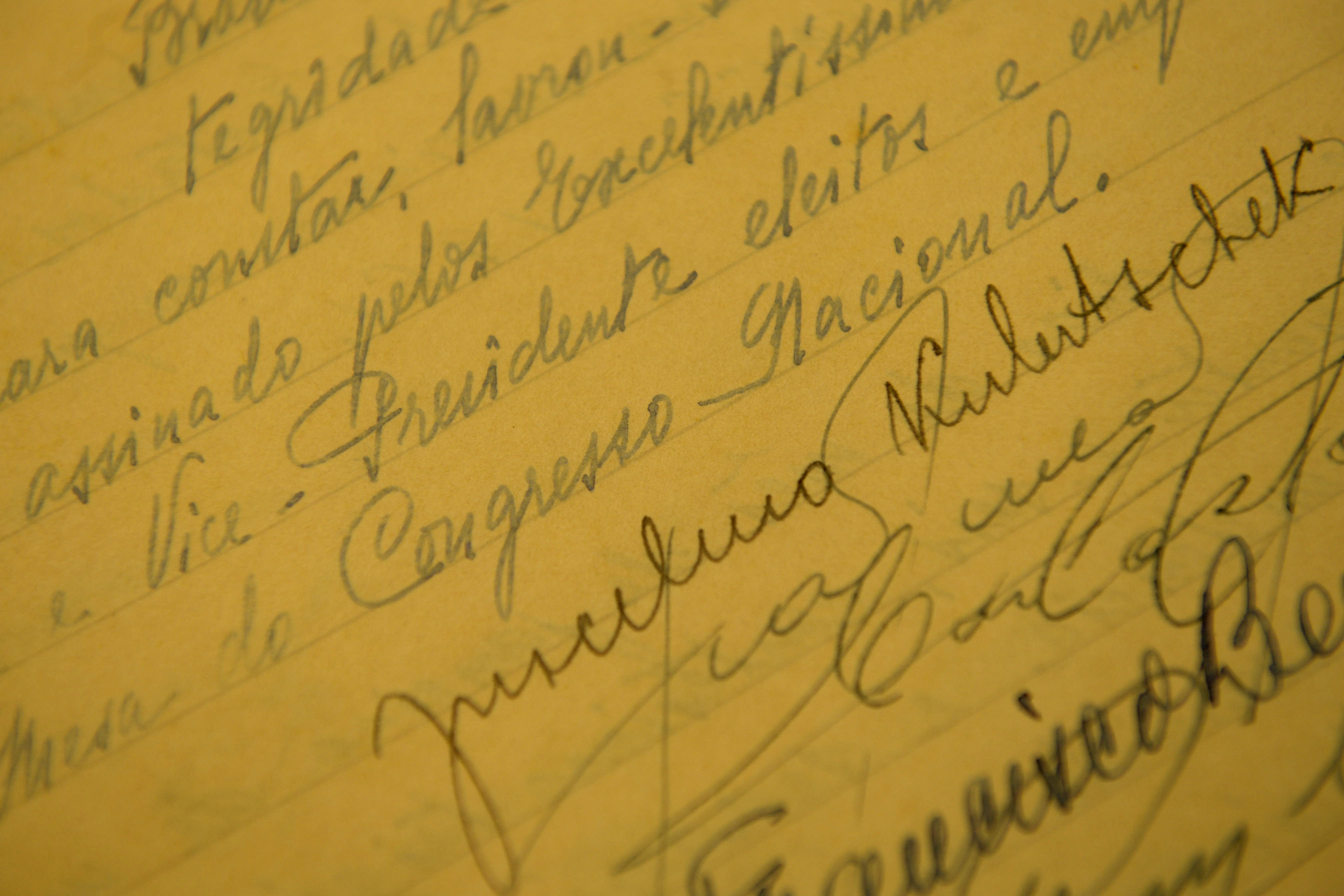 Senado preserva os livros que registram posses presidenciais desde 1891. Ao assinar o livro, o presidente eleito assume o compromisso de governar o país e defender a Constituição, dando prosseguimento à linha do tempo que vem sendo traçada desde 26 de fevereiro de 1891. O acesso aos dois volumes é restrito com o intuito de resguardar o patrimônio.Os documentos ficam guardados no Arquivo do Senado, em uma sala com temperatura, umidade e luminosidade submetidas a parâmetros rigorosos. Organizados em dois volumes pela Coordenação de Arquivo, esses documentos testemunham a evolução histórica da língua portuguesa, a partir de elementos como a perda sucessiva de arcaísmos.Termo de posse de Juscelino Kubitschek, que tomou posse em 31 de janeiro de 1956.Foto: Pedro França/Agência Senado